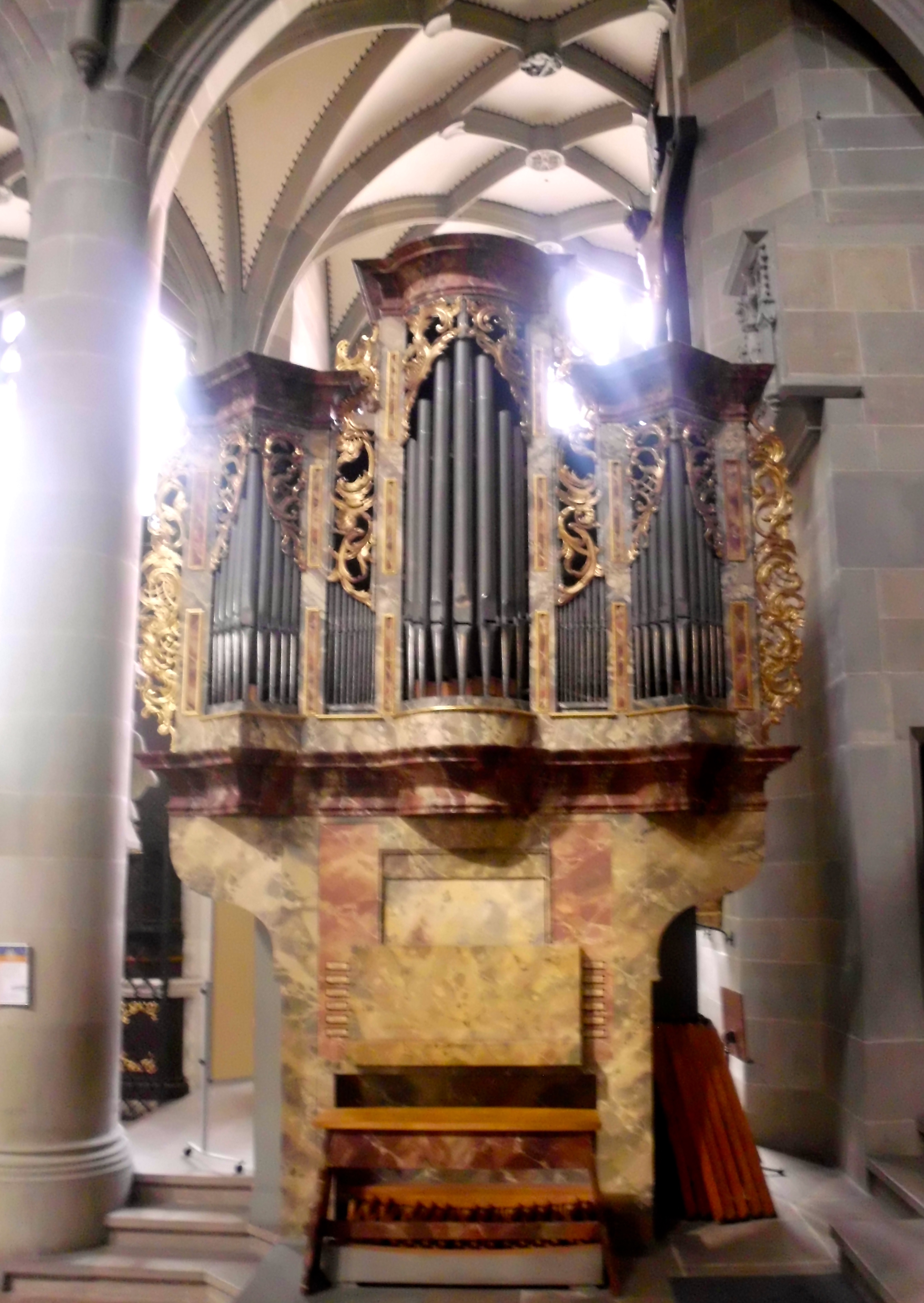 Überlingen, Münster St. Nikolaus, Marienorgel (Seuffert-Orgel)